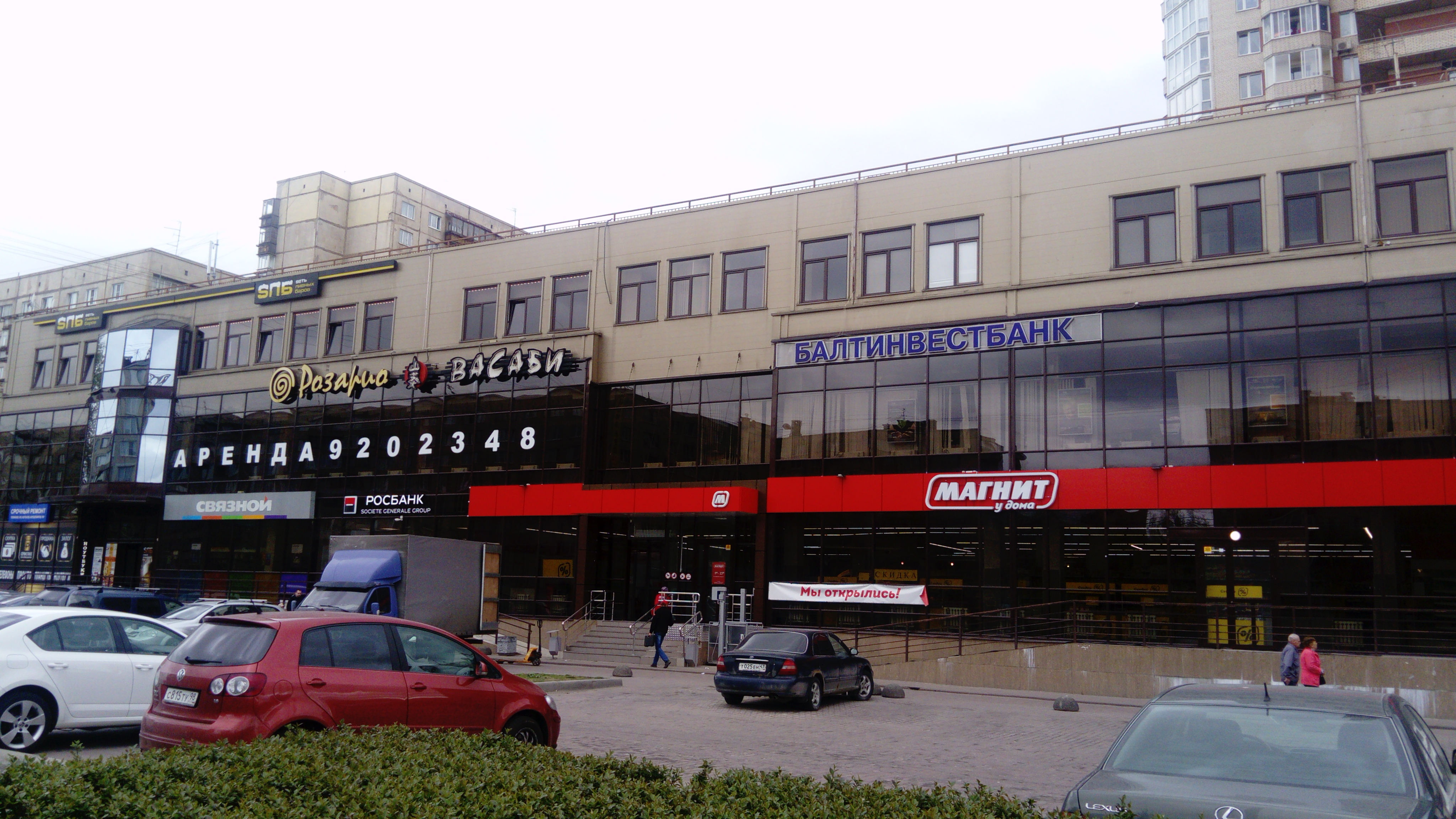 Улица Ярослава Гашека, 5. Санкт-Петербург. Фрунзенский район. Купчино